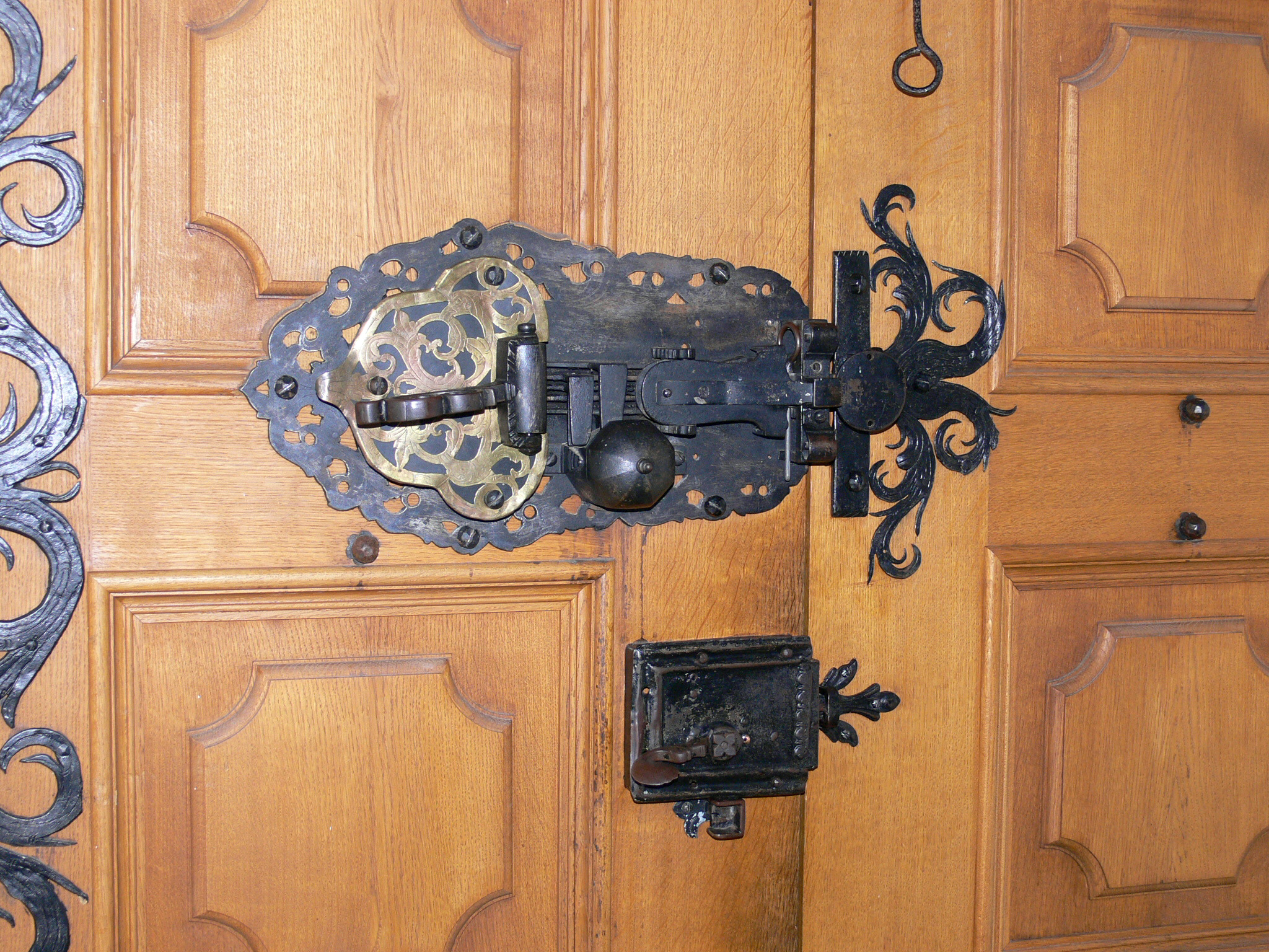 Bad Saulgau, Kloster Sießen, Klosterkirche, Schloss am Hauptportal